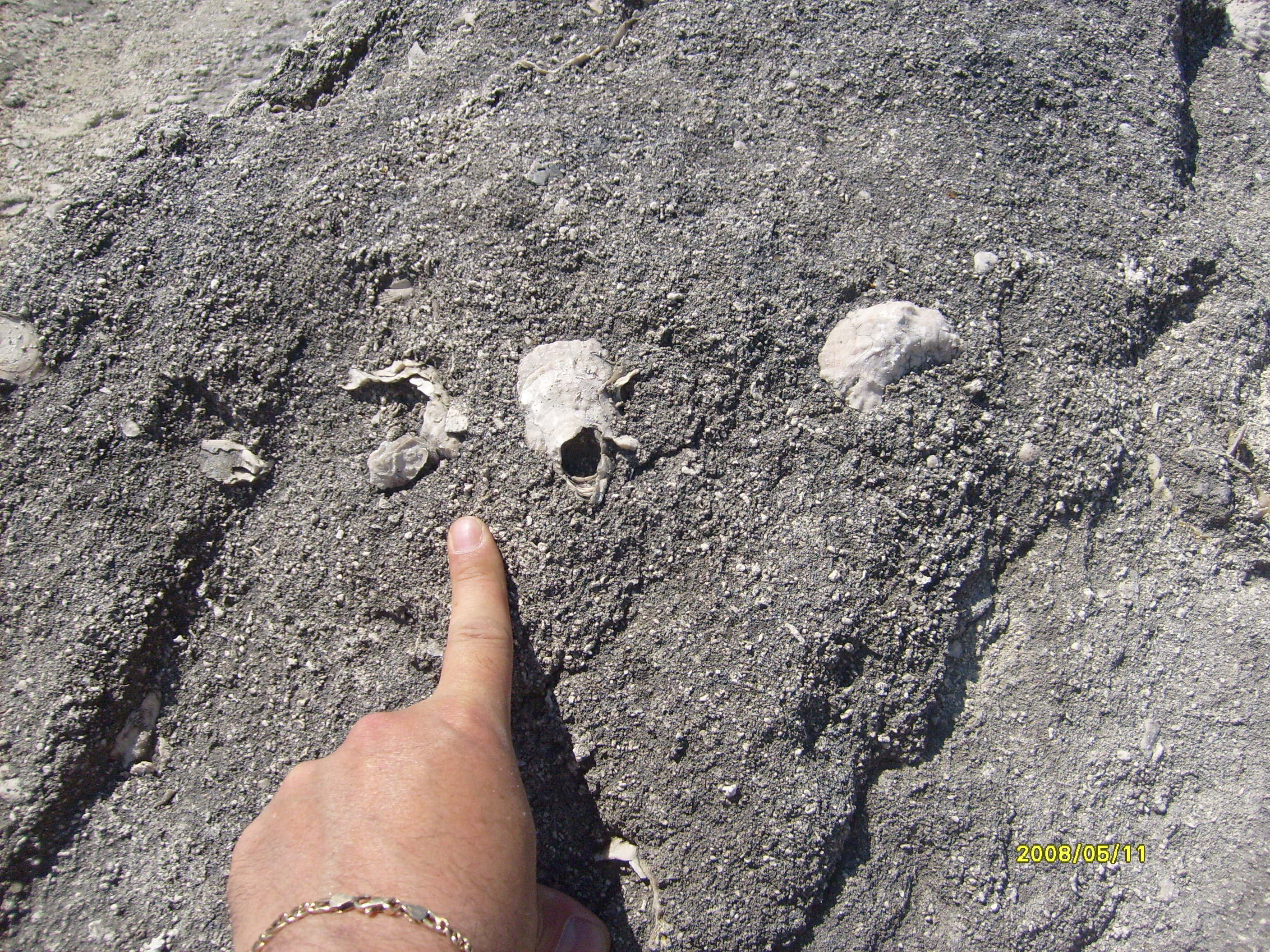 Fertőrákosi lezárt kőfejtő: lajtamészkő ősmaradványokkal